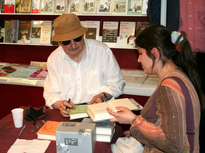 Sławomir Mrożek, Polish writer